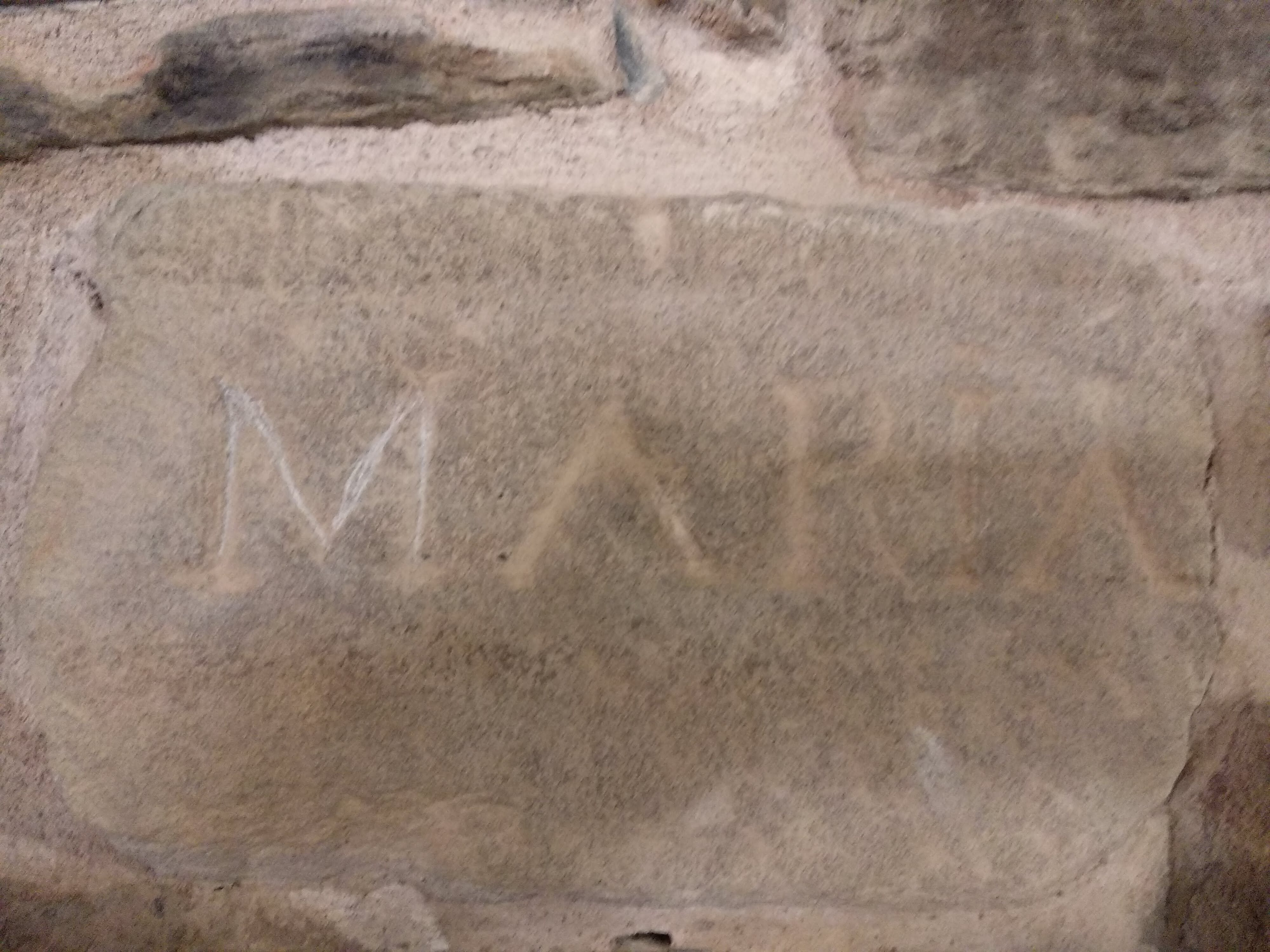 Piedra con inscripción tallada colocada dentro del local de los pendonistas de Albares de la Ribera.